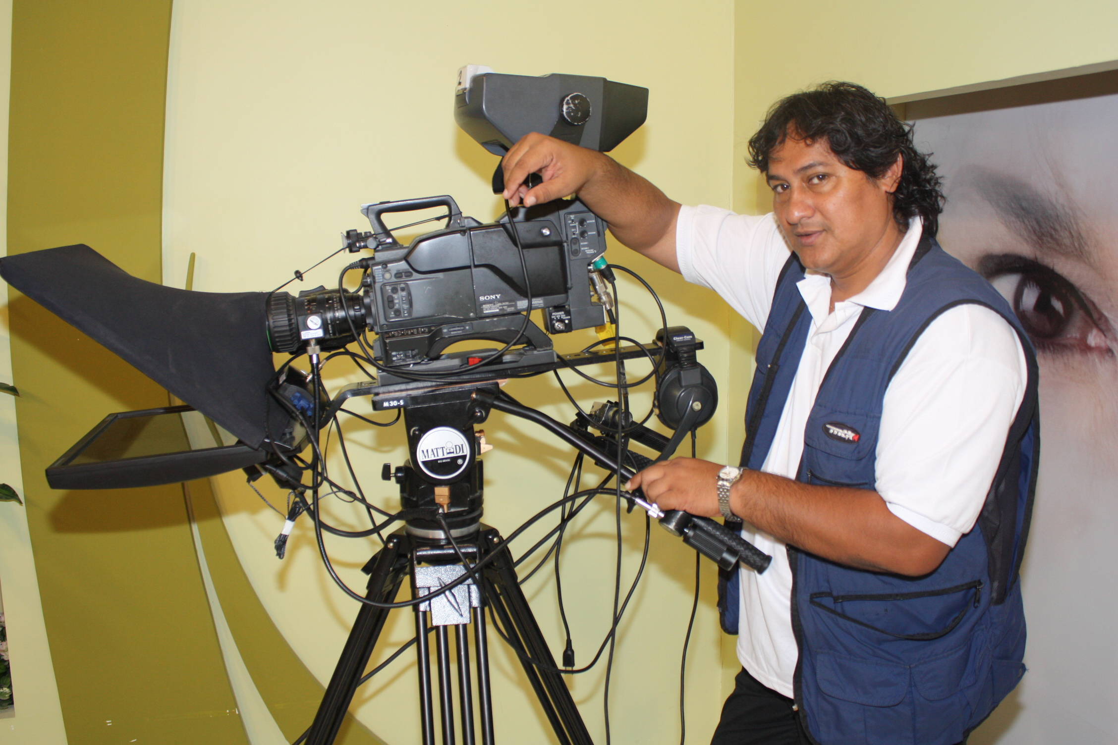 Kid Mahall produtor do progrma Nosso Encontro